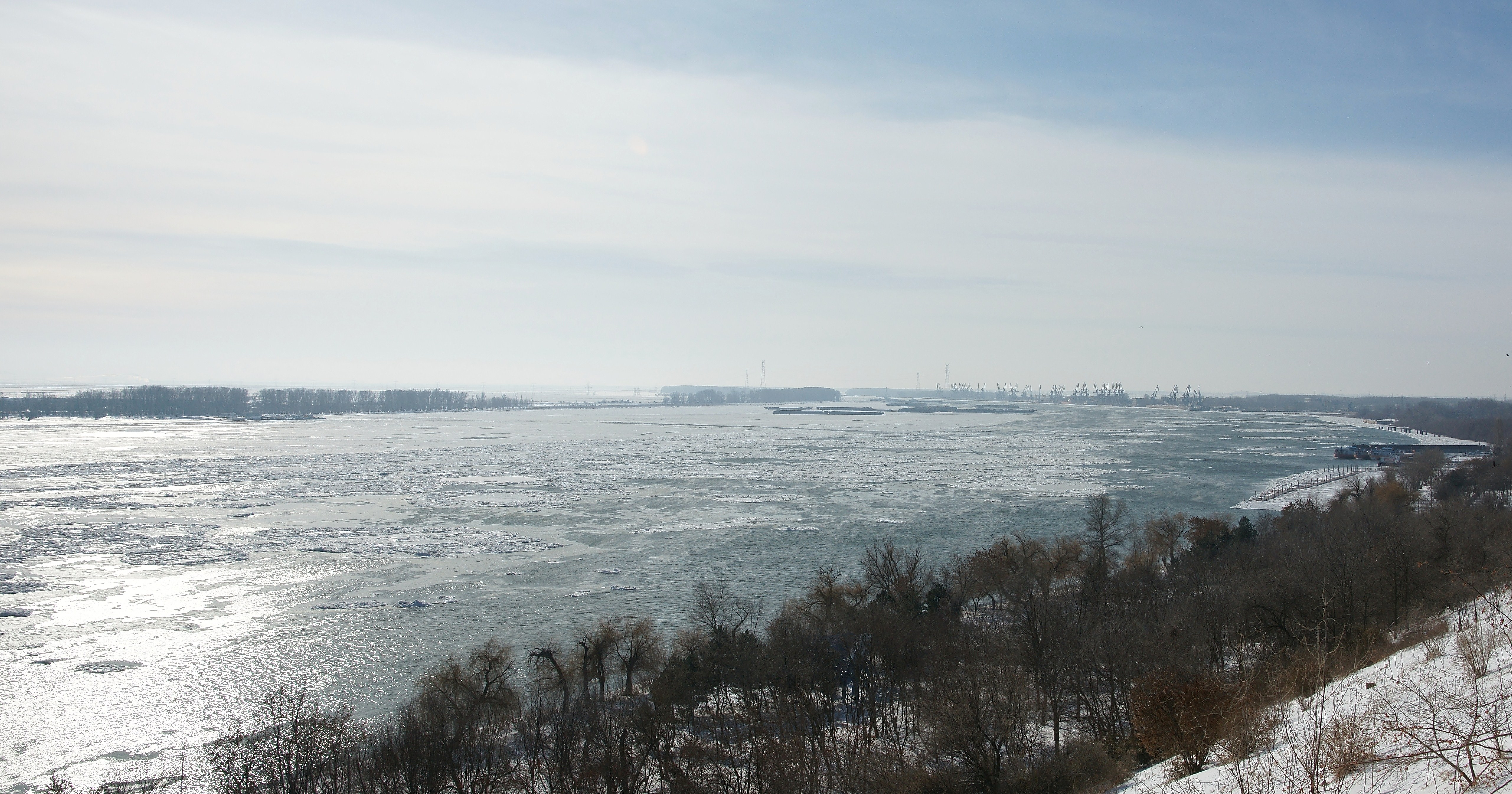 Dunarea inghetata la Galati, 08-Feb-2012